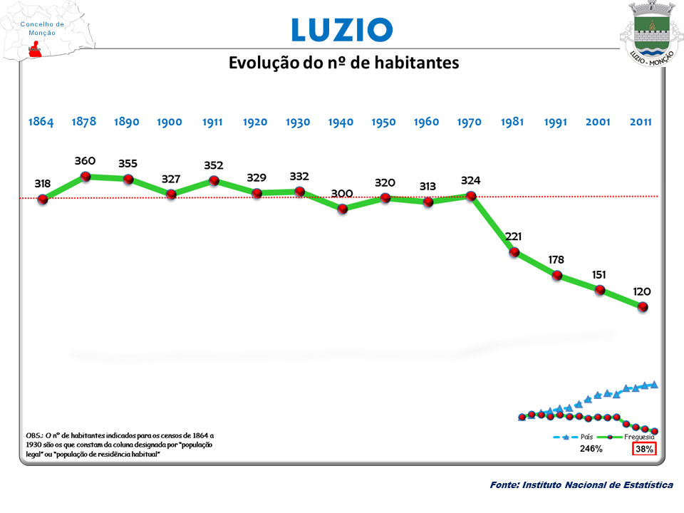 Censos 1864/2011